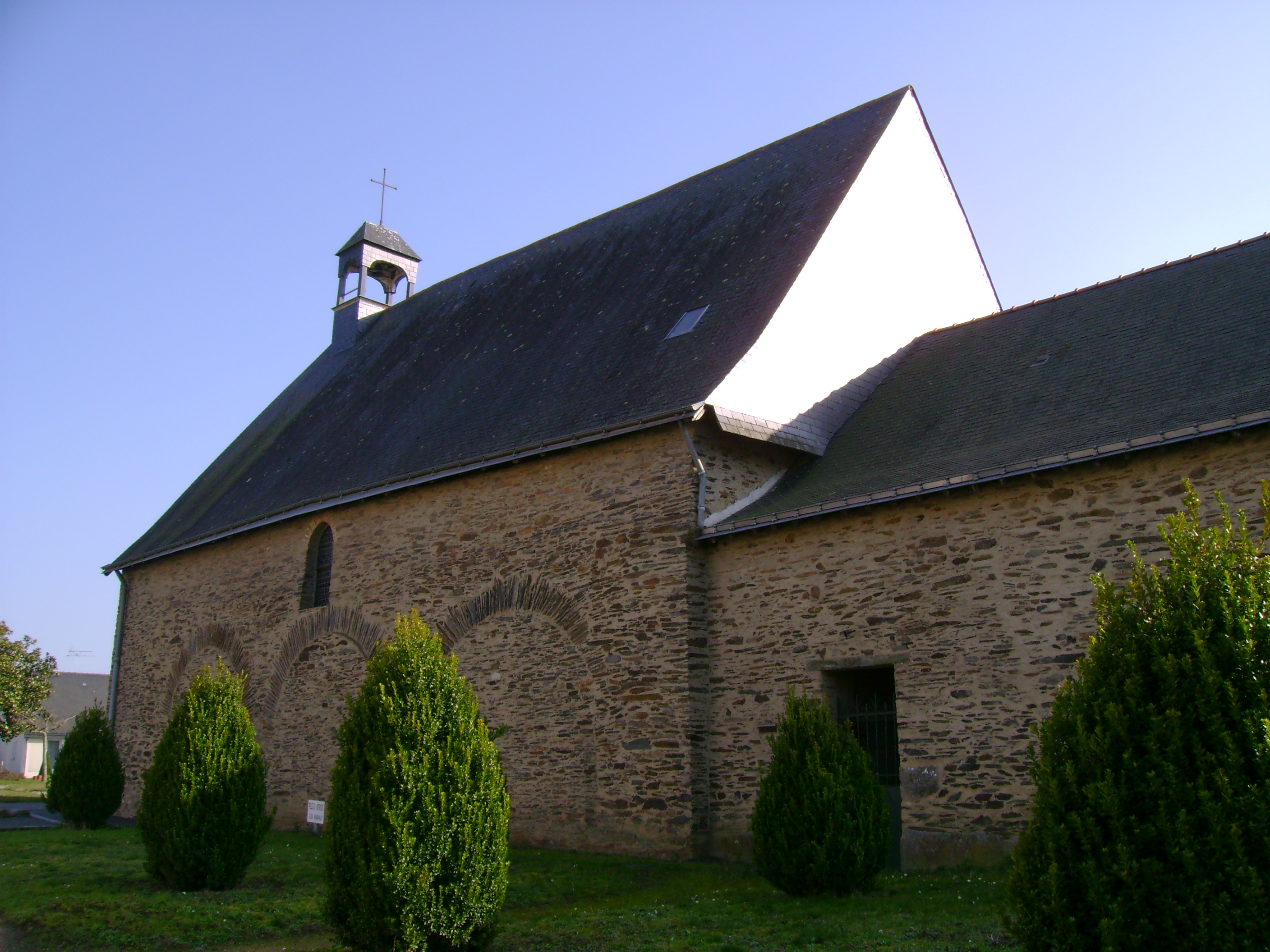 Chapelle Saint-Jean, à Candé, 49, France